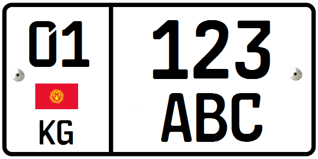 پلاک جدید جمهوری قرقیزستان